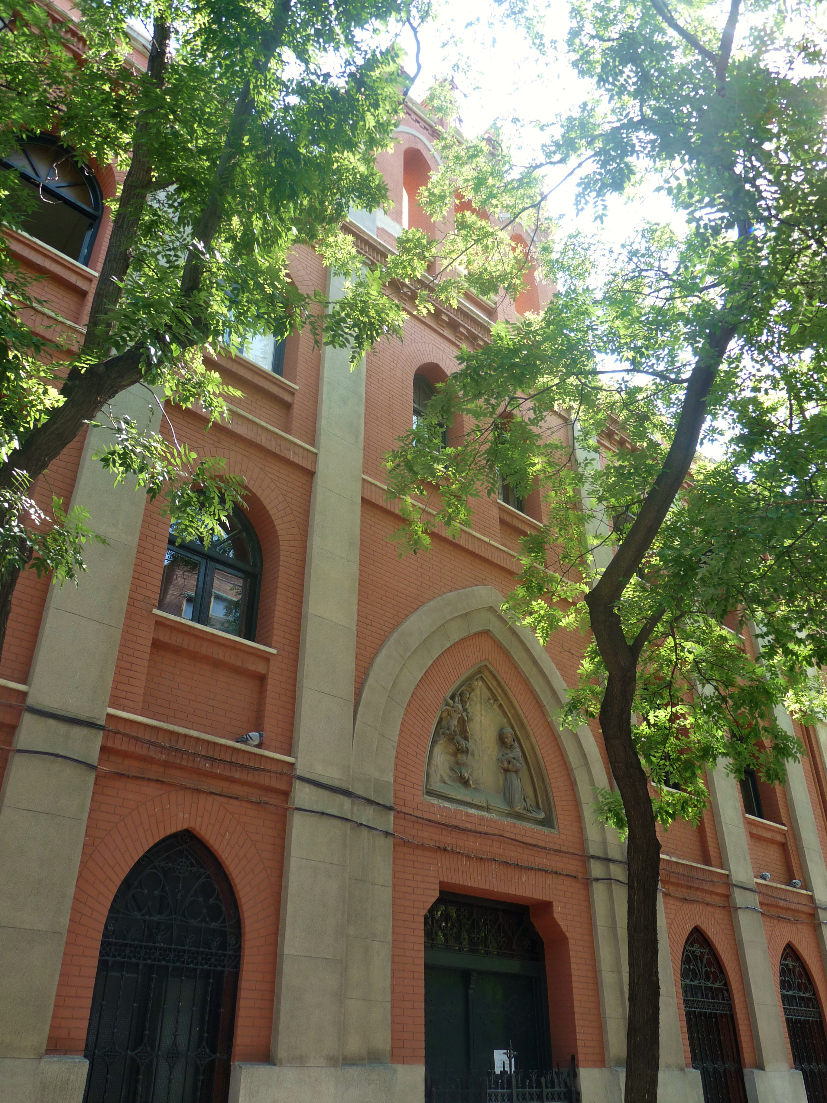 Iglesia del colegio Divina Pastora 01S.